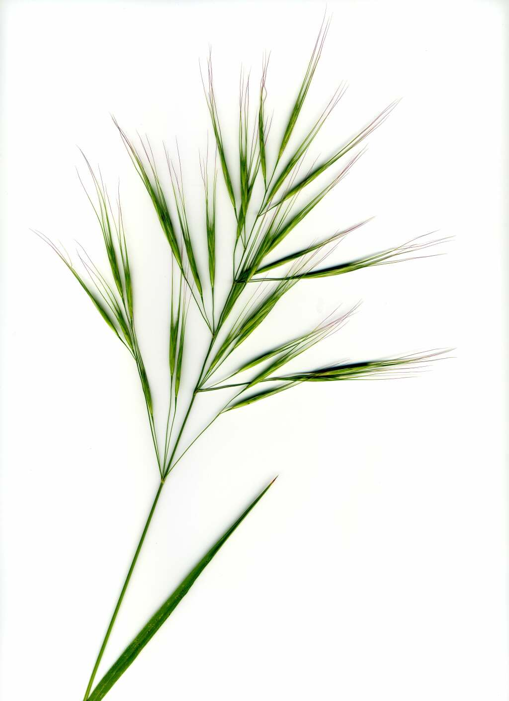 Brome stérile (scanné) Spedona